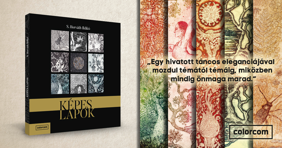 S. Horváth Ildikó Képes Lapok című kötetének borítója